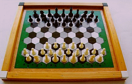 Tableiro de xadrez REX com as peças colocadas sobre o tabuleiro nas posições referente ao início de uma partida.